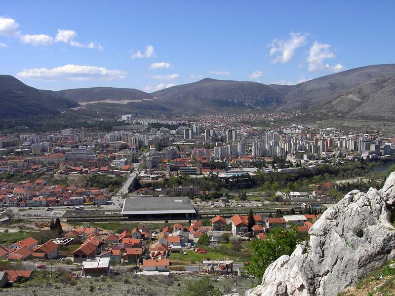 Panorama grda Mostara